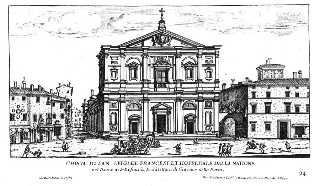 Chiesa di San Luigi dei Francesi et Hospedale della Natione